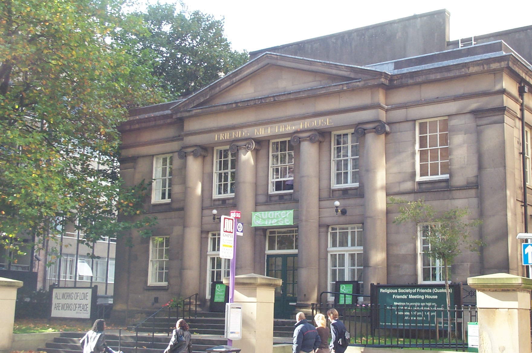 Friends Meeting House, Manchester, 2005-10-20. Copyright © 2005 Kaihsu Tai.